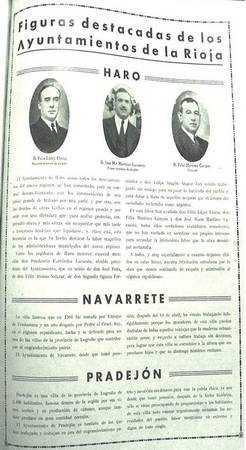 Pradejón elogiado en el "Libro de Oro" de la República. Villa "famosa por sus vinos, aceites y su producción de cáñamo".